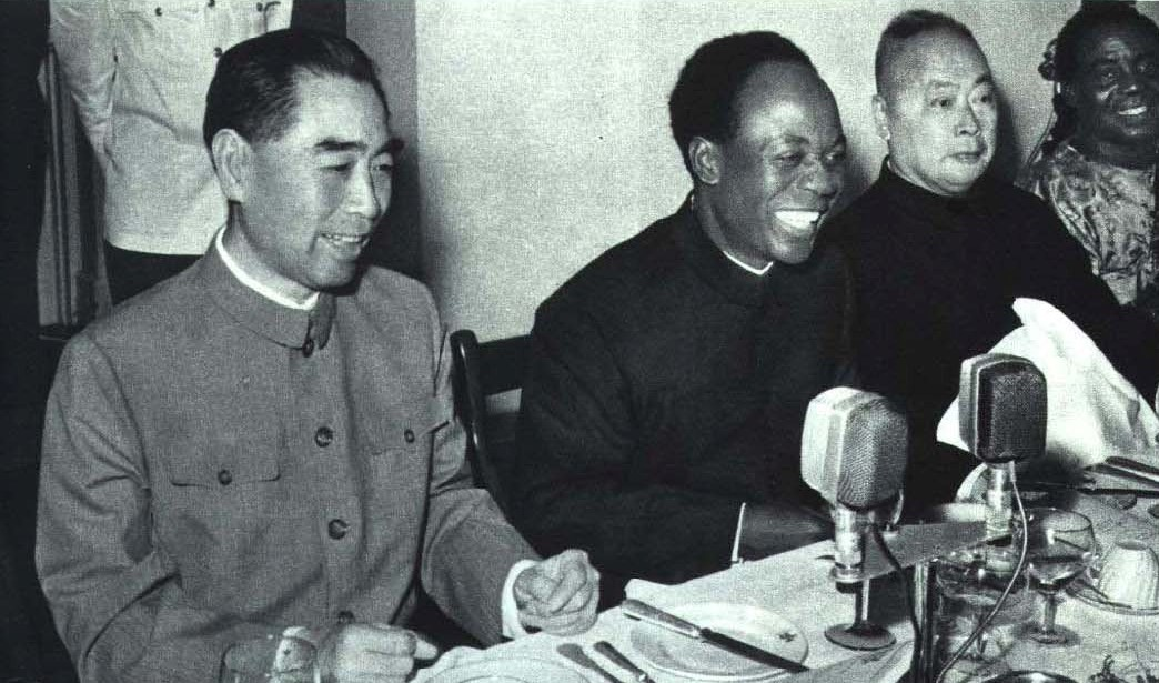 1964-04 1964年 中国访问加纳 周恩来与恩克鲁玛